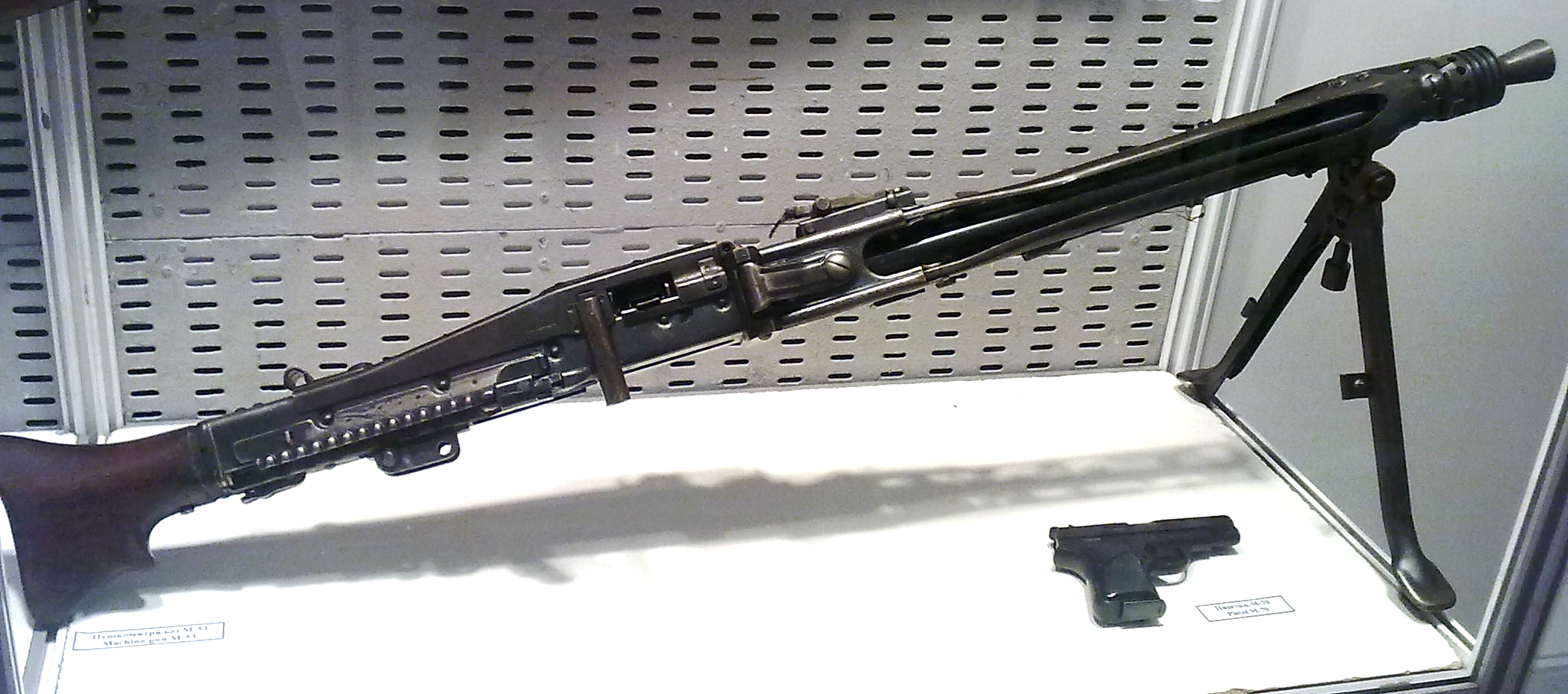 м53 митраљез, из партизанских филмова познатији као Шарац. Иначе рађен по узору на МГ42, најбољи митраљез 2. светског рата.